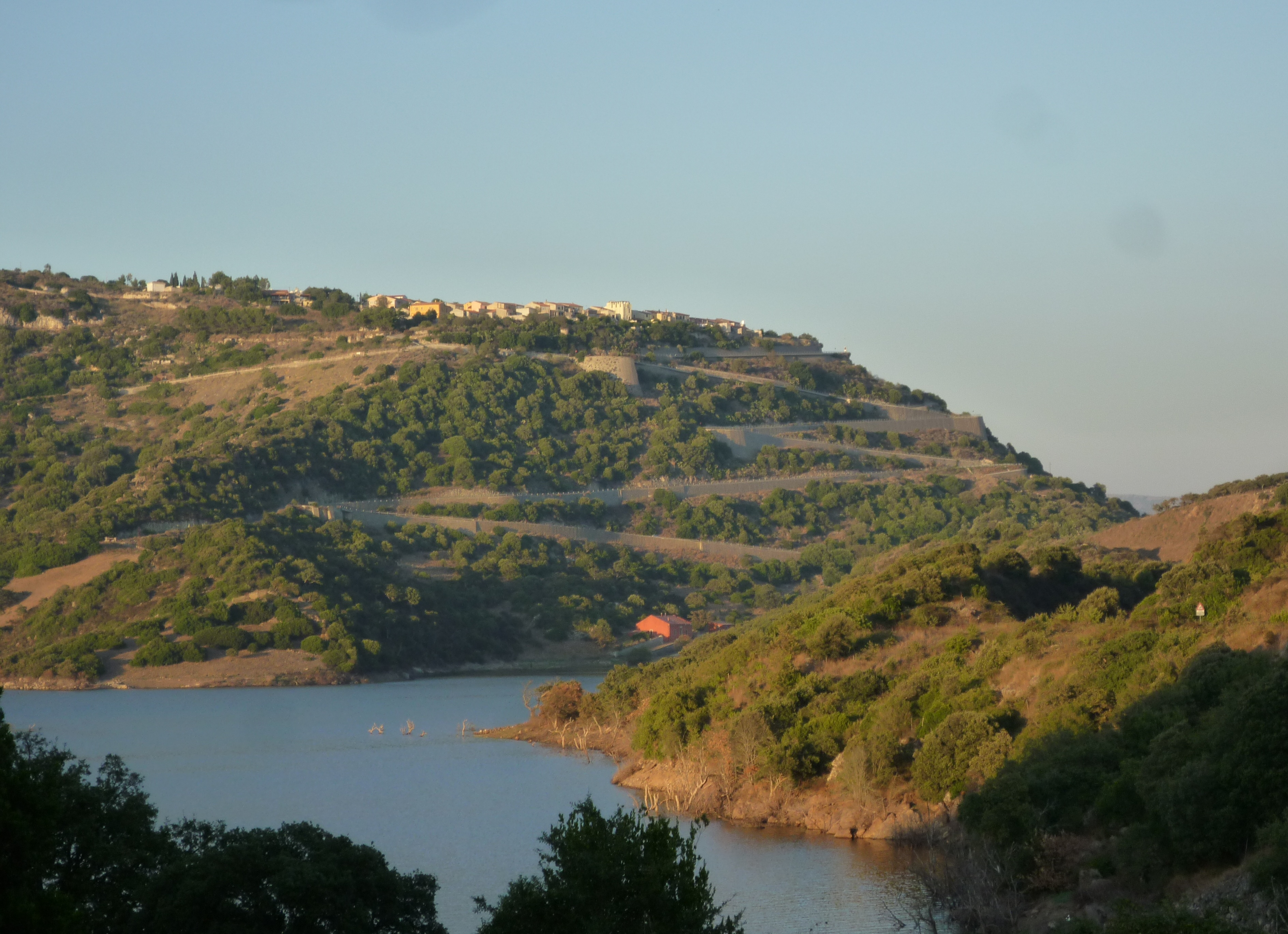 Panorama di Monteleone Roccadoria (Sassari)